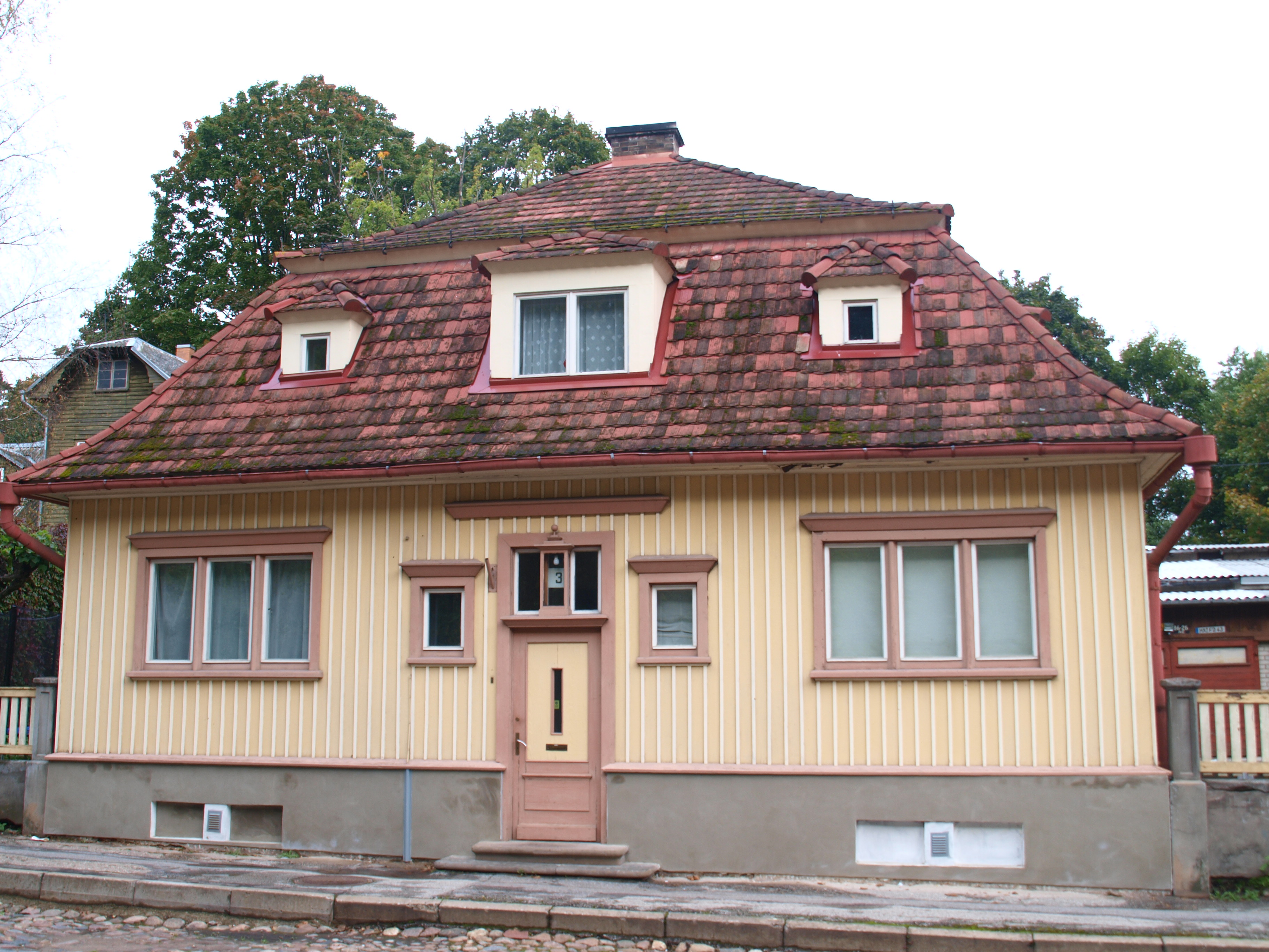 Elamu Tartus Pargi 3, 1931-1933.a.